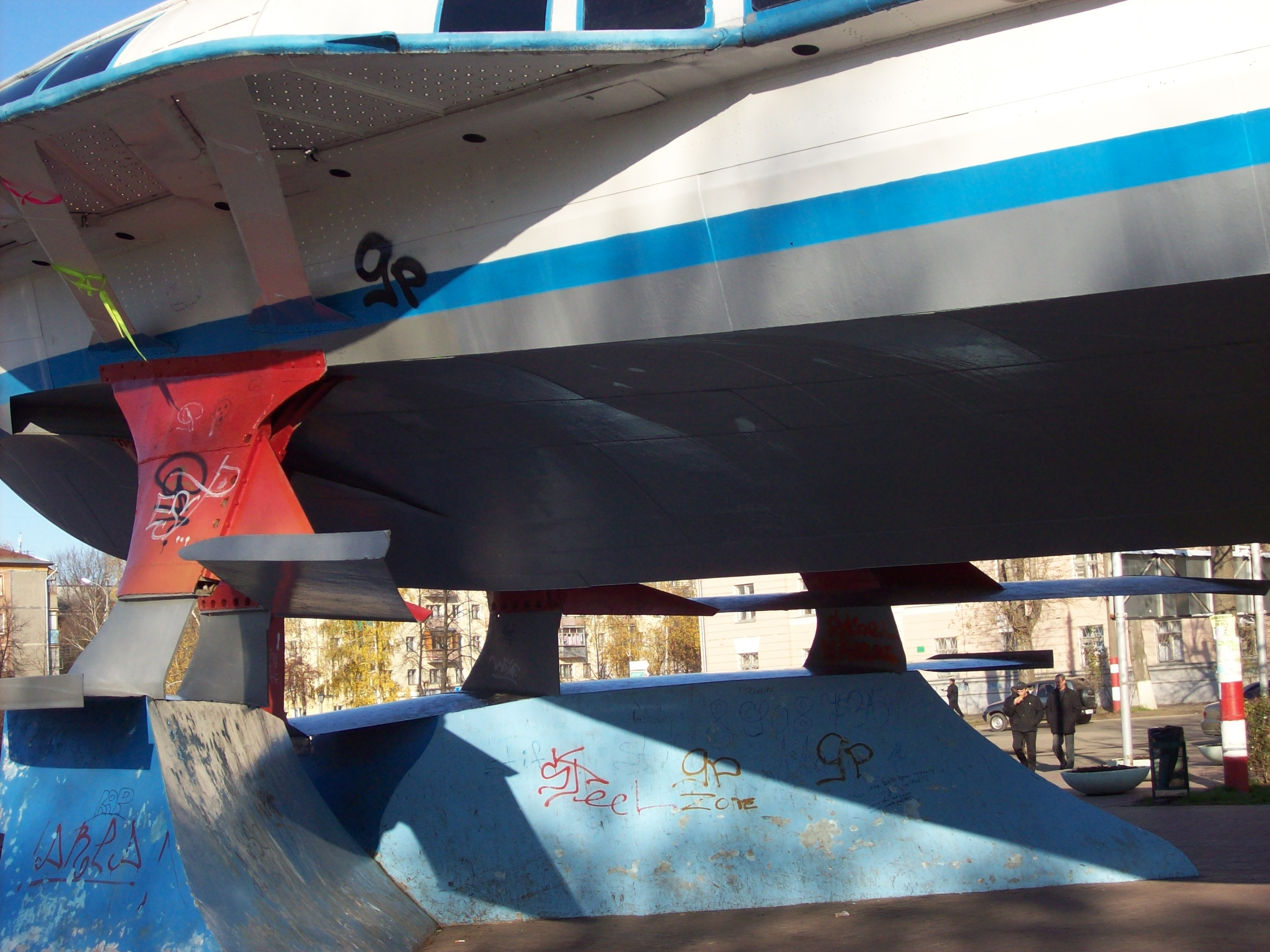 Метеор на постаменте в Сормове (Нижний Новгород)